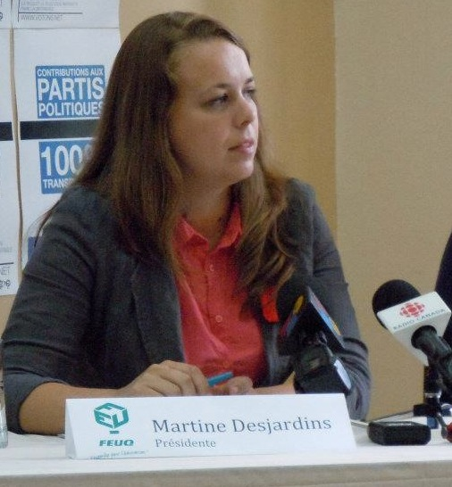 La présidente de la FEUQ, Martine Desjardins, en conférence de presse le 2 août 2012 pour présenter la stratégie de la Fédération concernant les élections provinciales en cours.